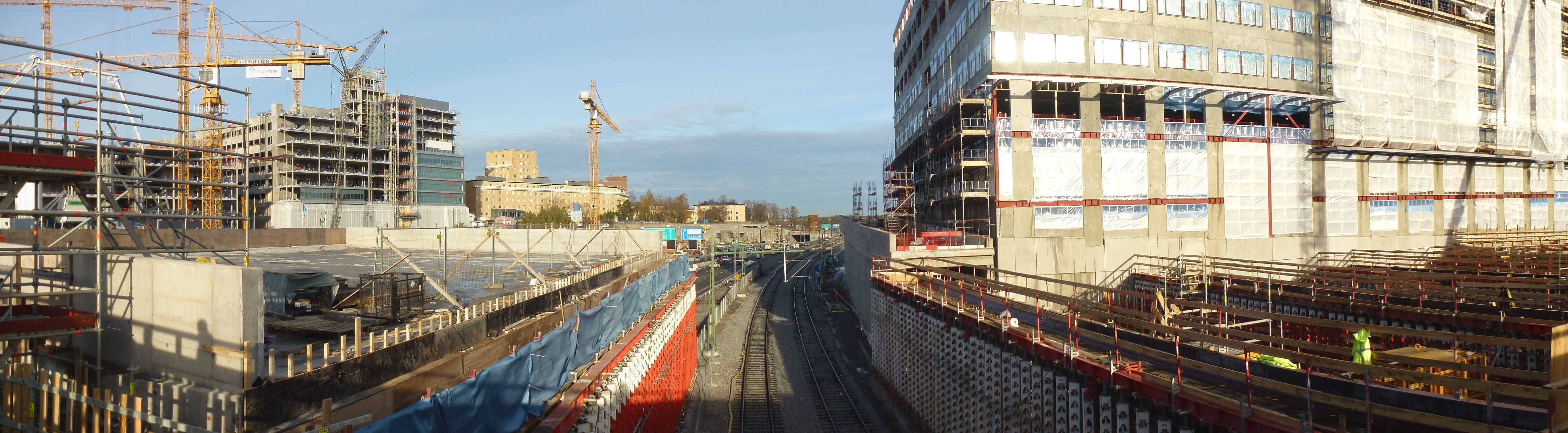 Hagastaden panorama mot ost